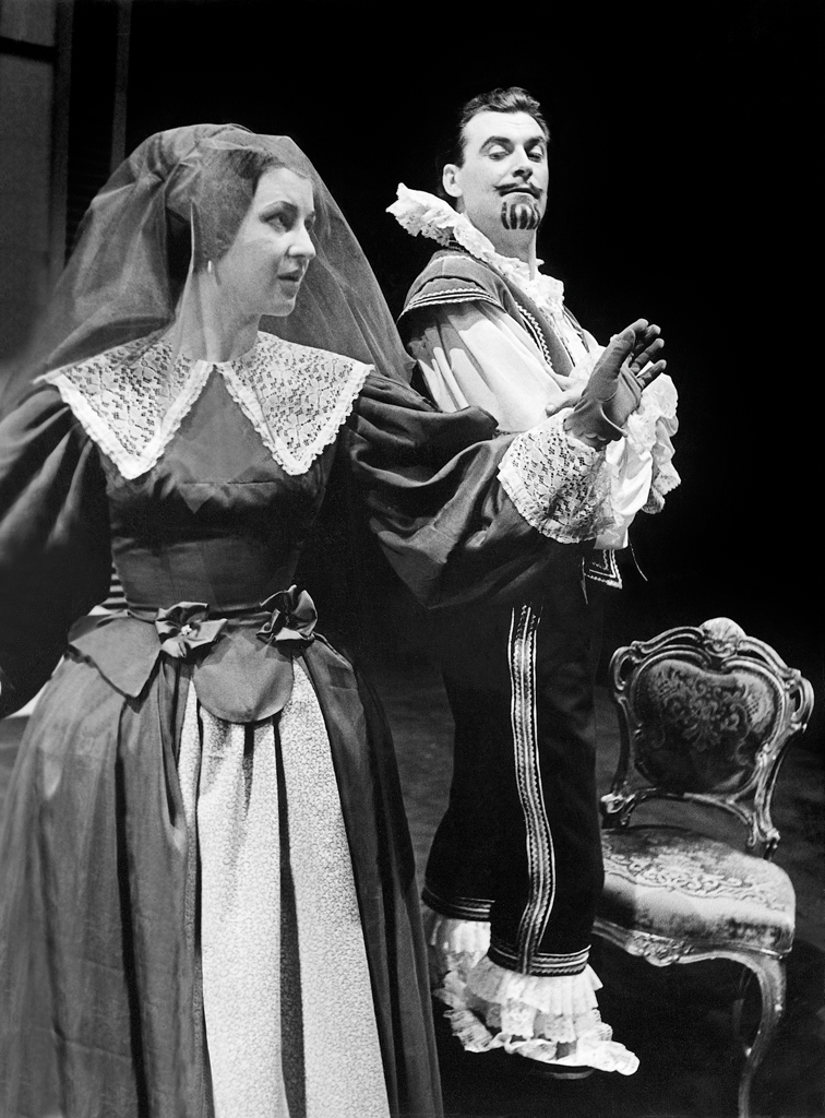 Jean-Baptiste Poquelin Molière, Don Juan ali Kamniti gost, Drama SNG v Ljubljani. Na fotografiji: Slavka Glavina (Elvira), Boris Kralj (Don Juan).